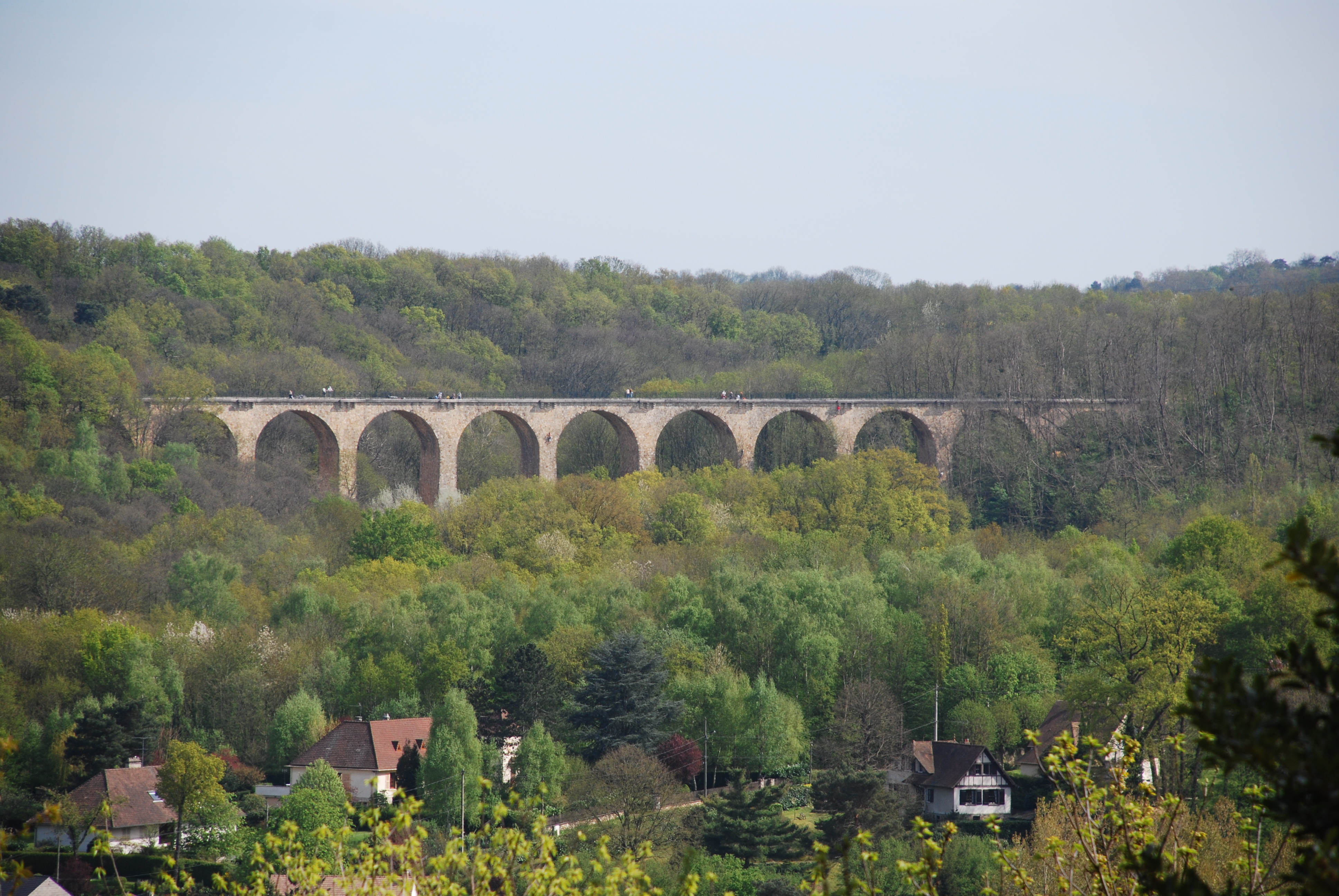 Viaduc des Fauvettes depuis la Hacquinière